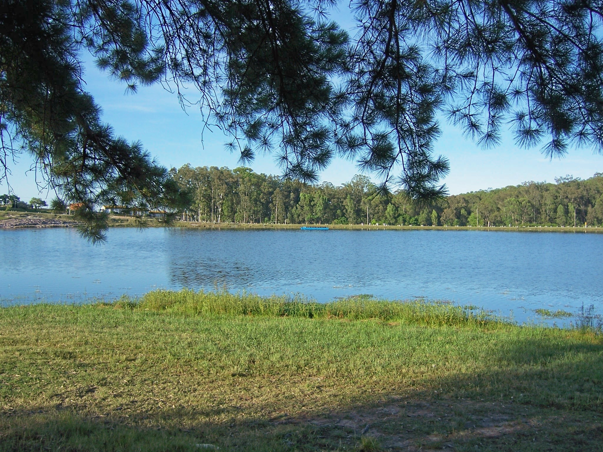 Vista de uno de los lagos del Balneario Iporá, Tacuarembó, Uruguay.